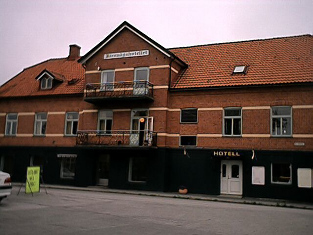 Järnvägshotellet i Vitaby. Foto: Väsk